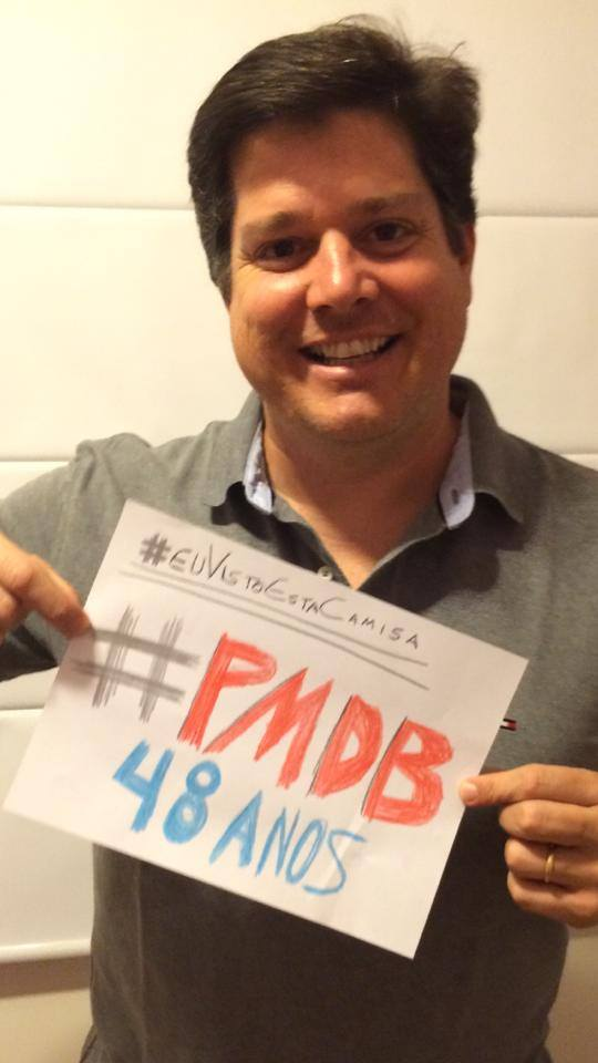 Deputado Baleia Rossi